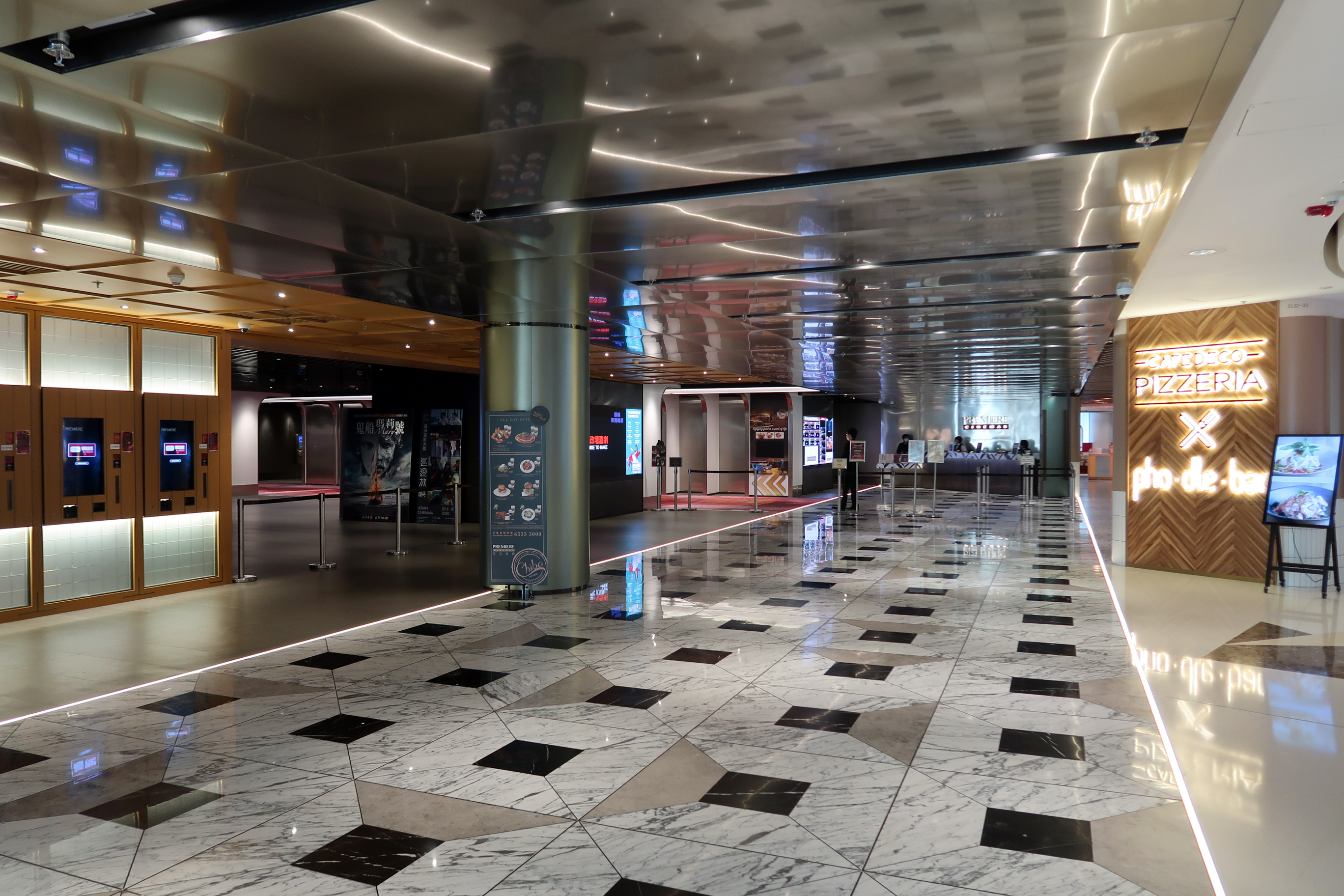 Premiere Elements Lobby